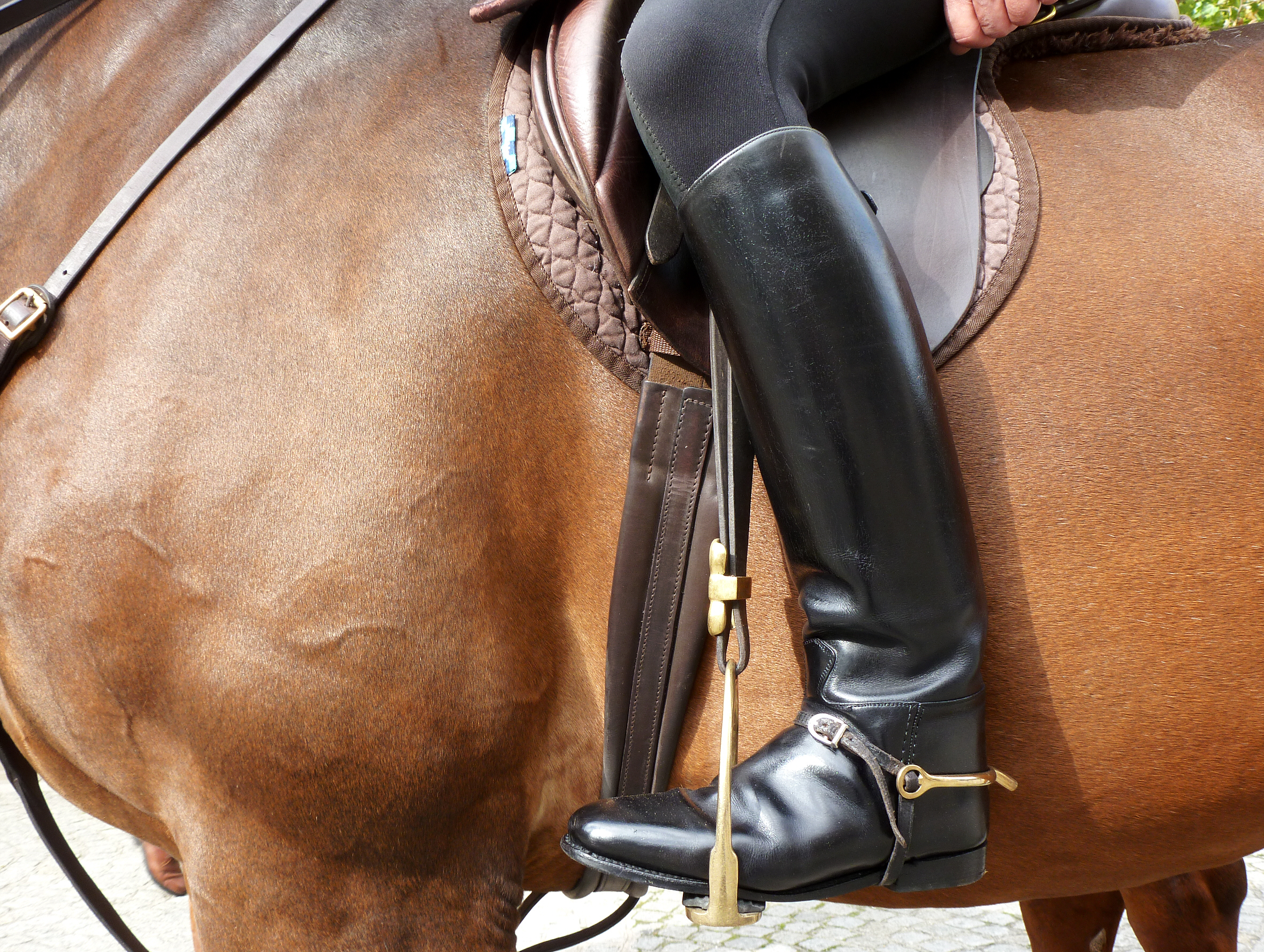 Schwarze Reitstiefel der berittenen Polizei von London.